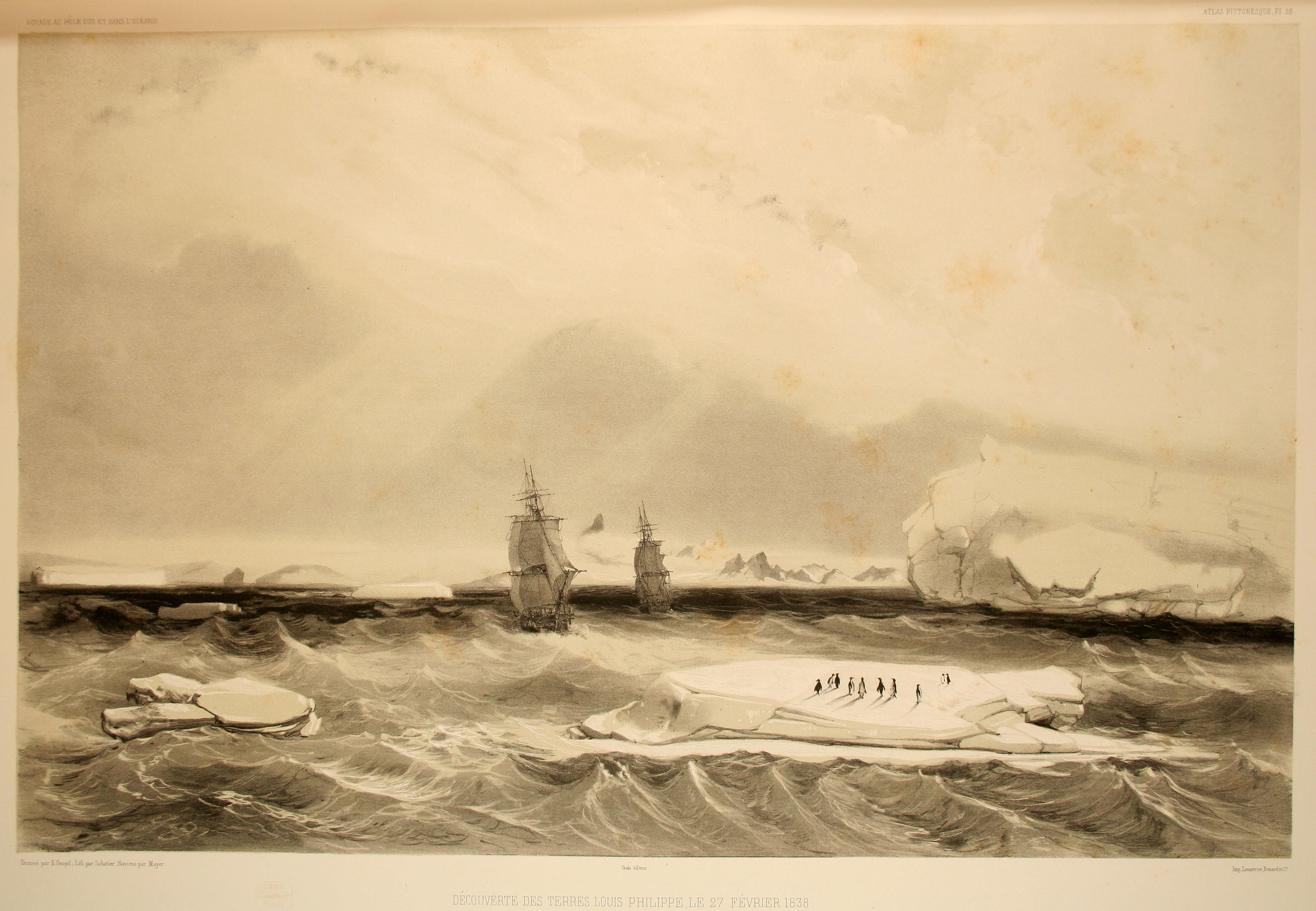 Découverte des terres Louis-Philippe (terre de Graham aujourd'hui) le 27 février 1838. Atlas pittoresque, planche 28